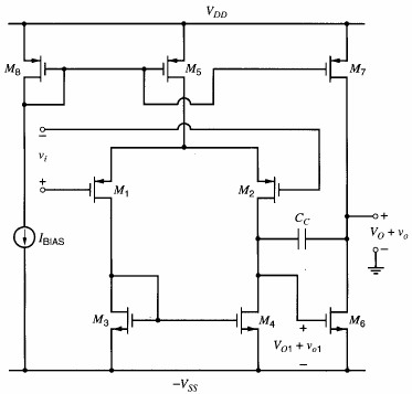 Detaljnija šema kola sa slike 1